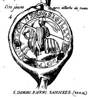 Segell de 1214 de Nunó Sanç (1185-1241).